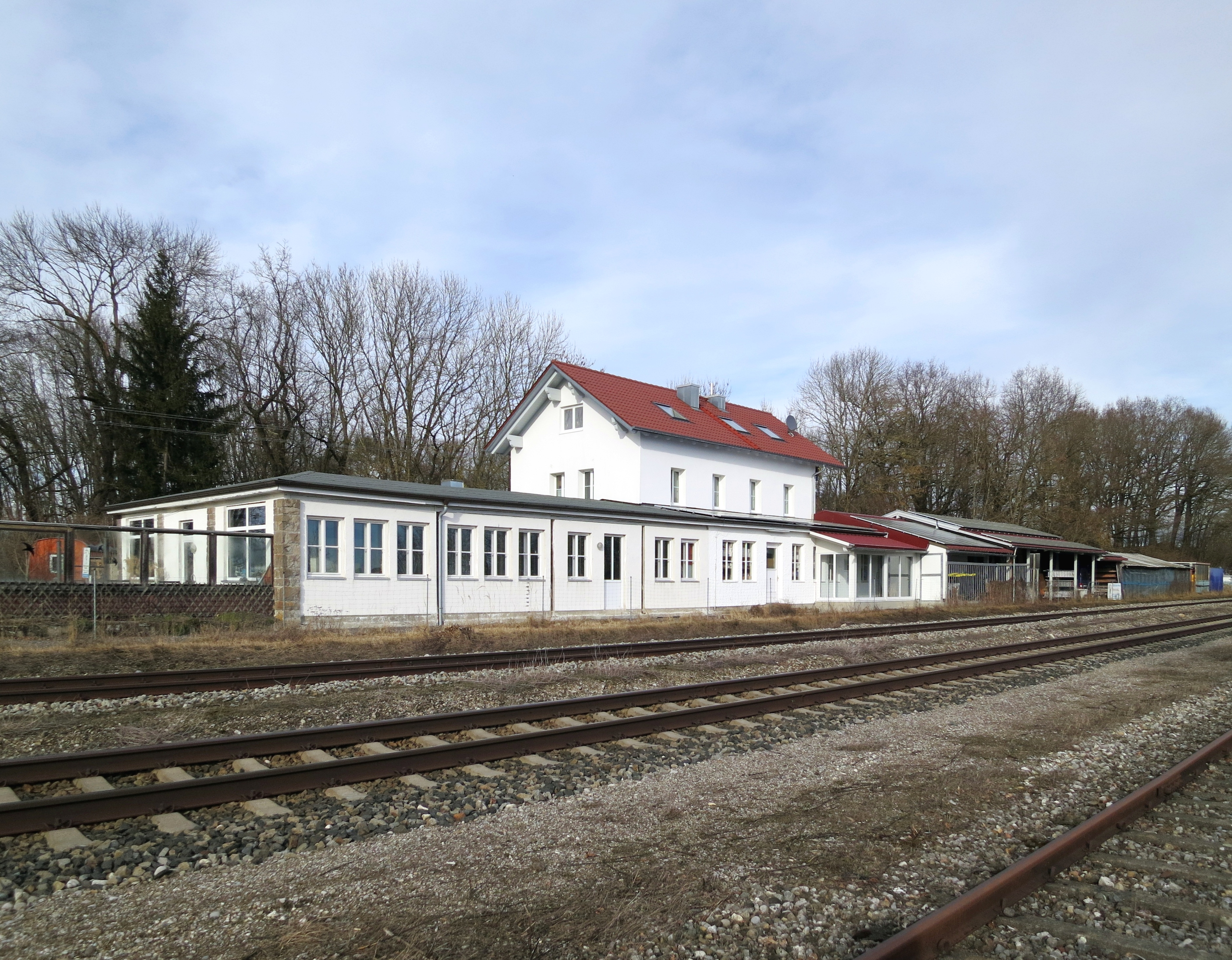 ehemaliges Empfangsgebäude des Bahnhofs Epfenhausen von der Gleisseite im Jahr 2014